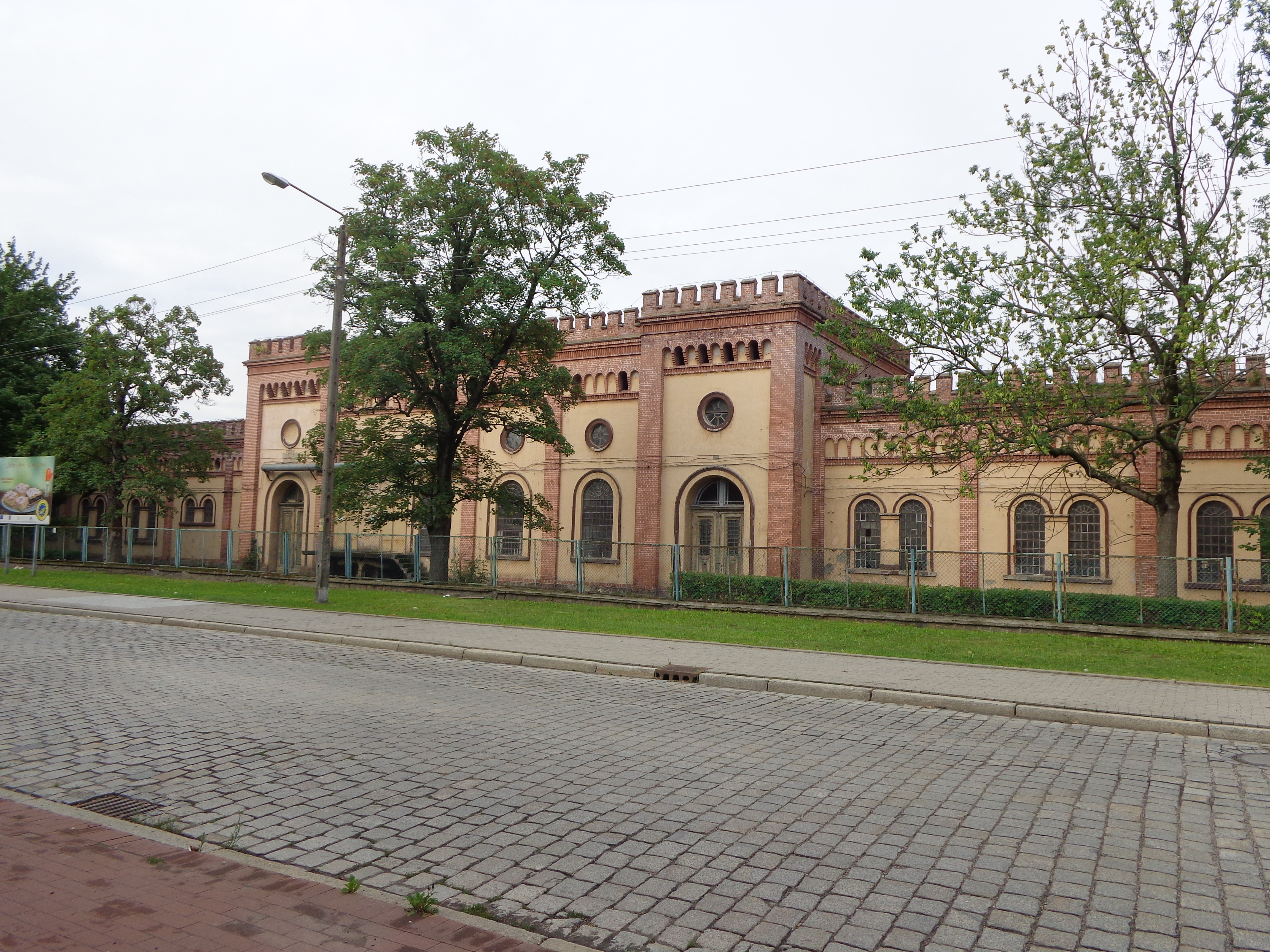 Hala produkcyjna od strony Wykończalni byłych Zakłady Przemysłu Bawełnianego „Frotex“ w Prudniku. Stan na 20 lipca 2018.